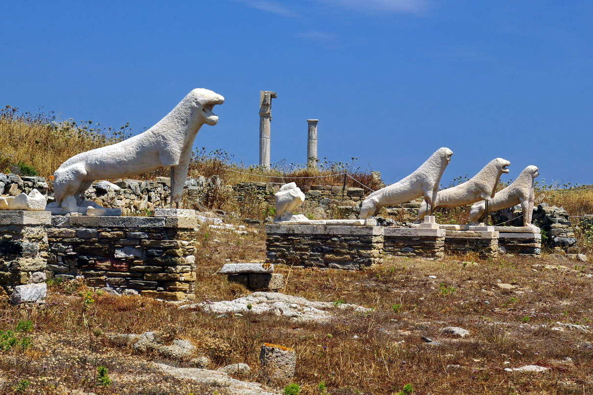 Löwenterrasse Delos